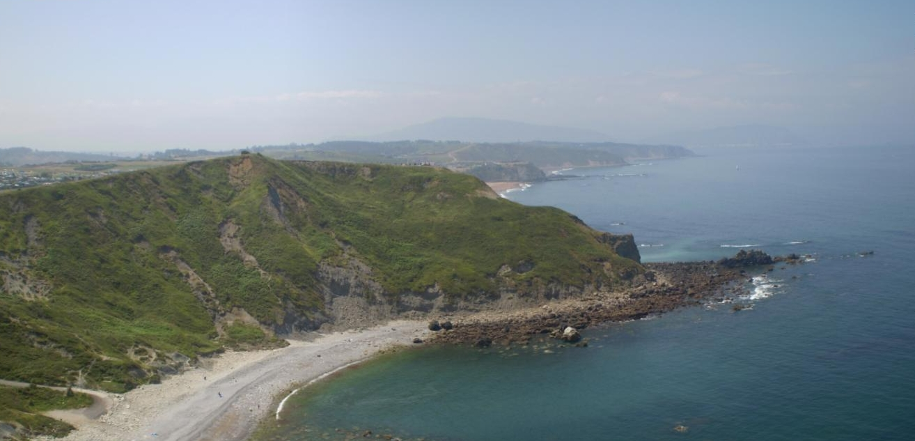 Sopelako Meñakoz hondartzaren ikuspegia.